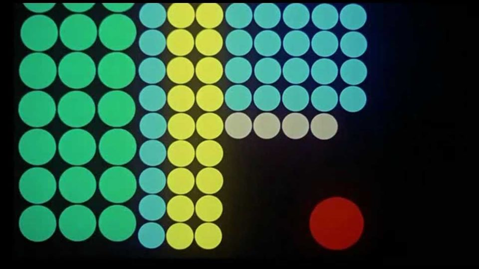 Заставка британского шпионского фильма 1962 года «Доктор Ноу».